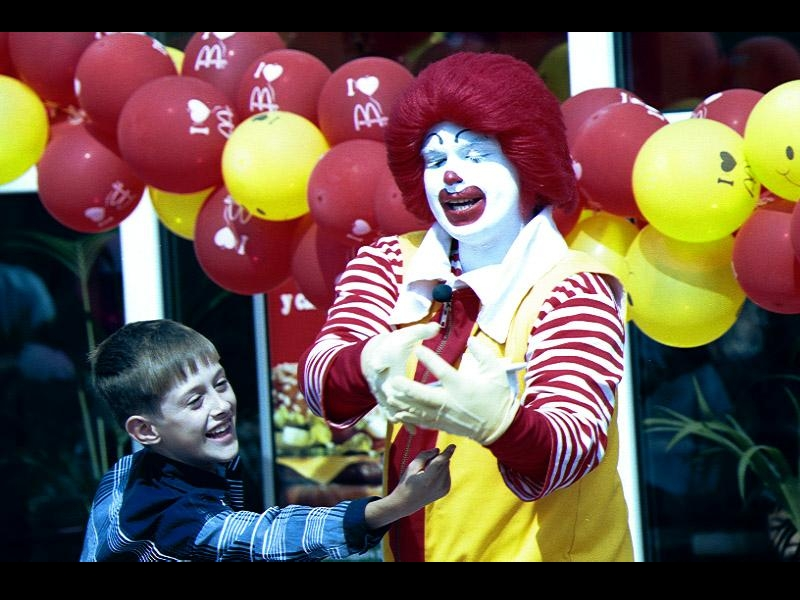 Фотография с диска Анастасии Федоренко «Донецк. Увидеть и полюбить».